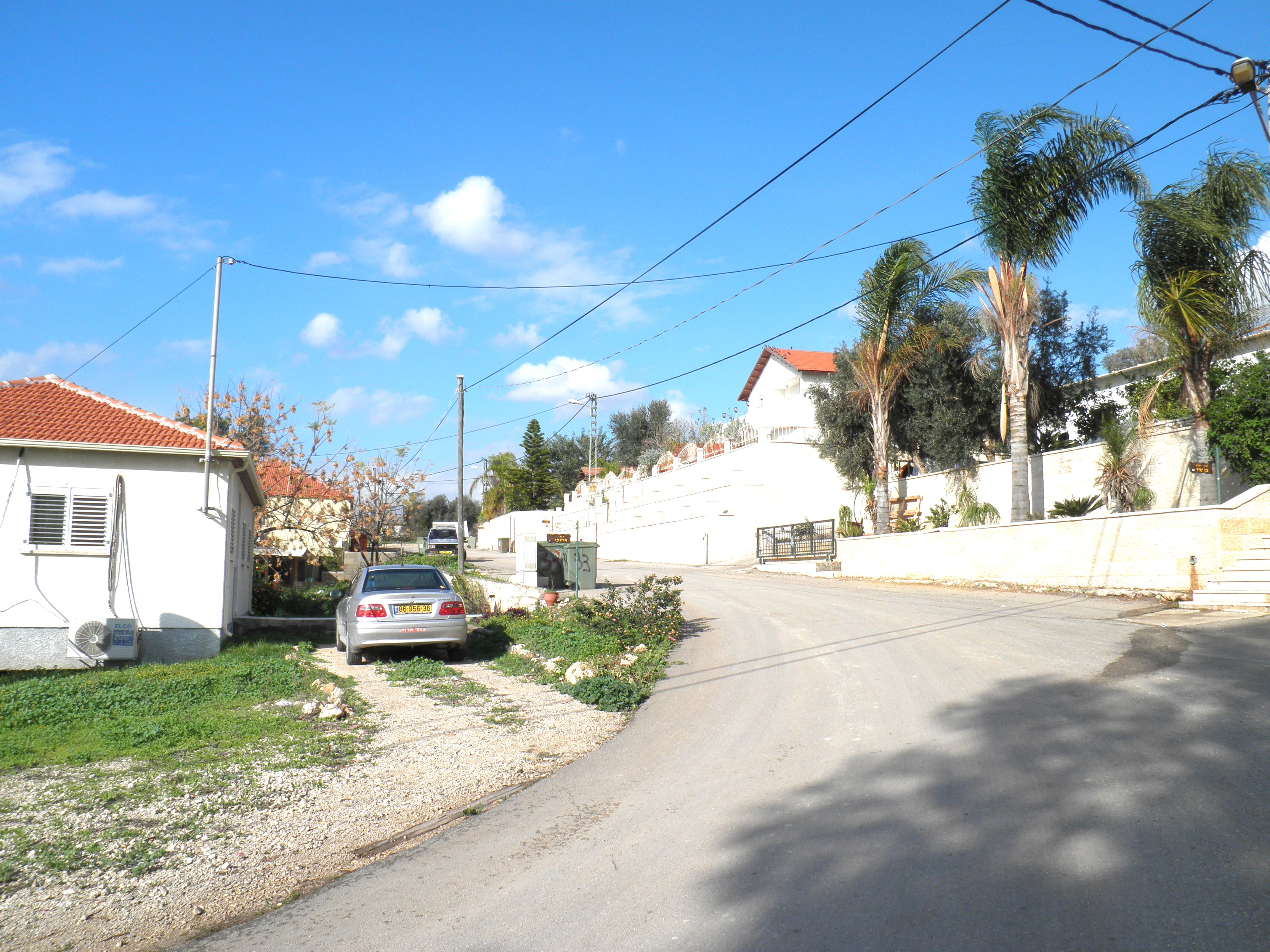 Mahseya רחוב במושב